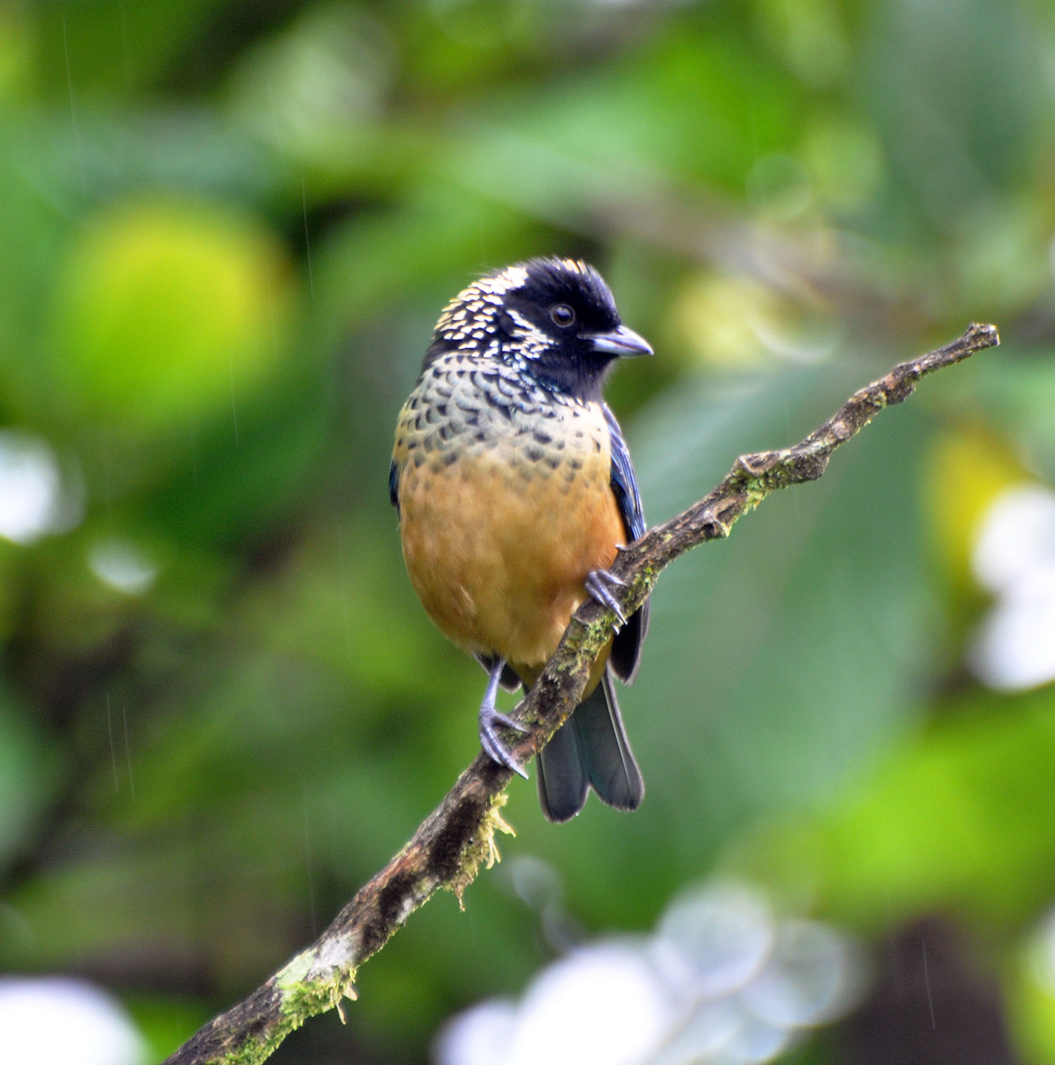 Tangara dowii 18-Mar-12 La Paz, Costa Rica